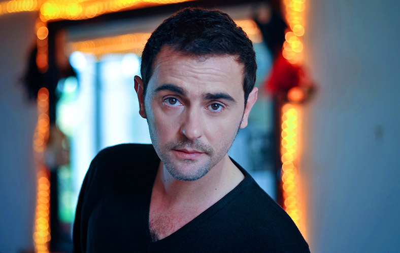 Photo prise par Olivier Sochard